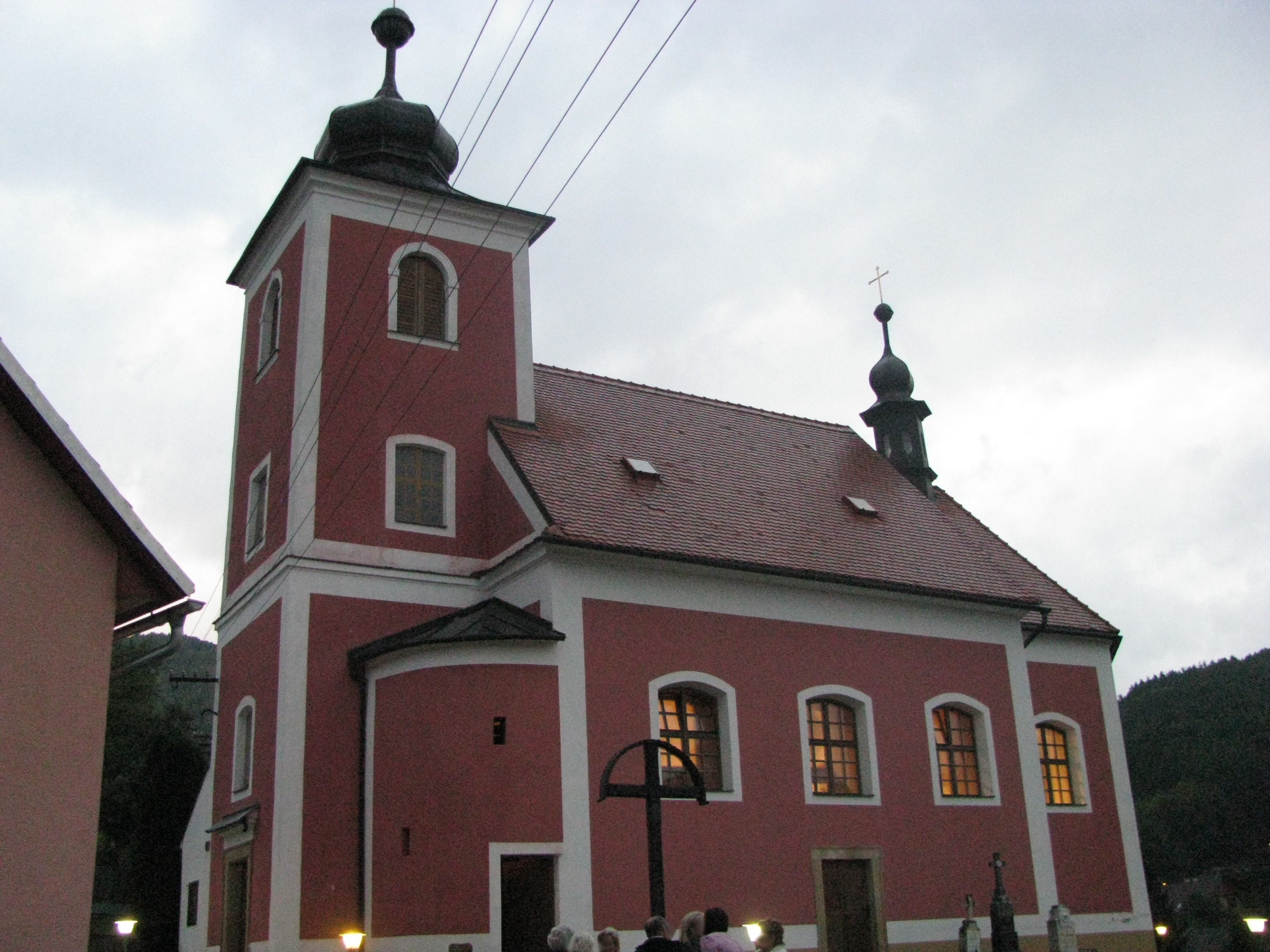 Kostel sv. Diviše (Horní Lhota), Horní Lhota